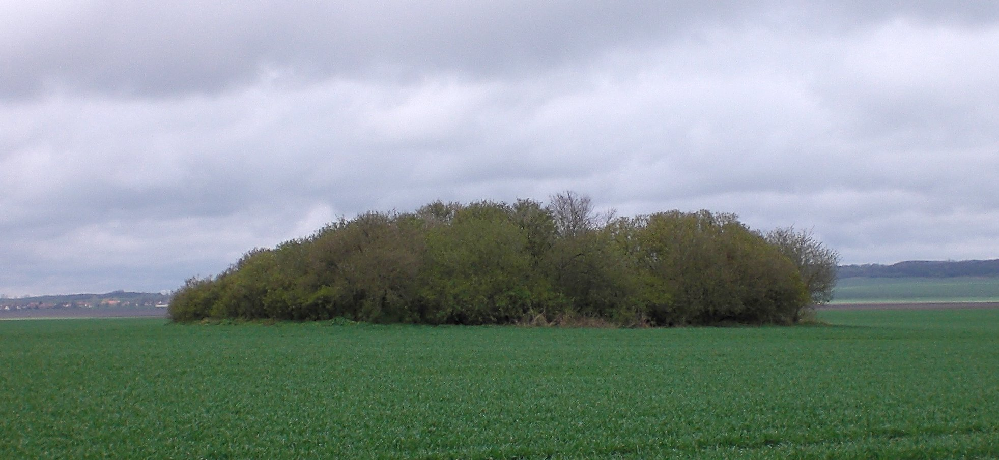 Das die Peseckendorfer Warte umgebende Feldgehölz bei Oschersleben